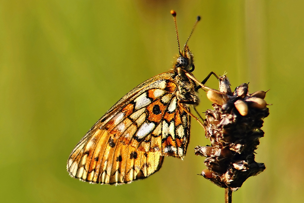 Perleťovec dvanáctitečný (Boloria selene), Plzeňsko, 2014